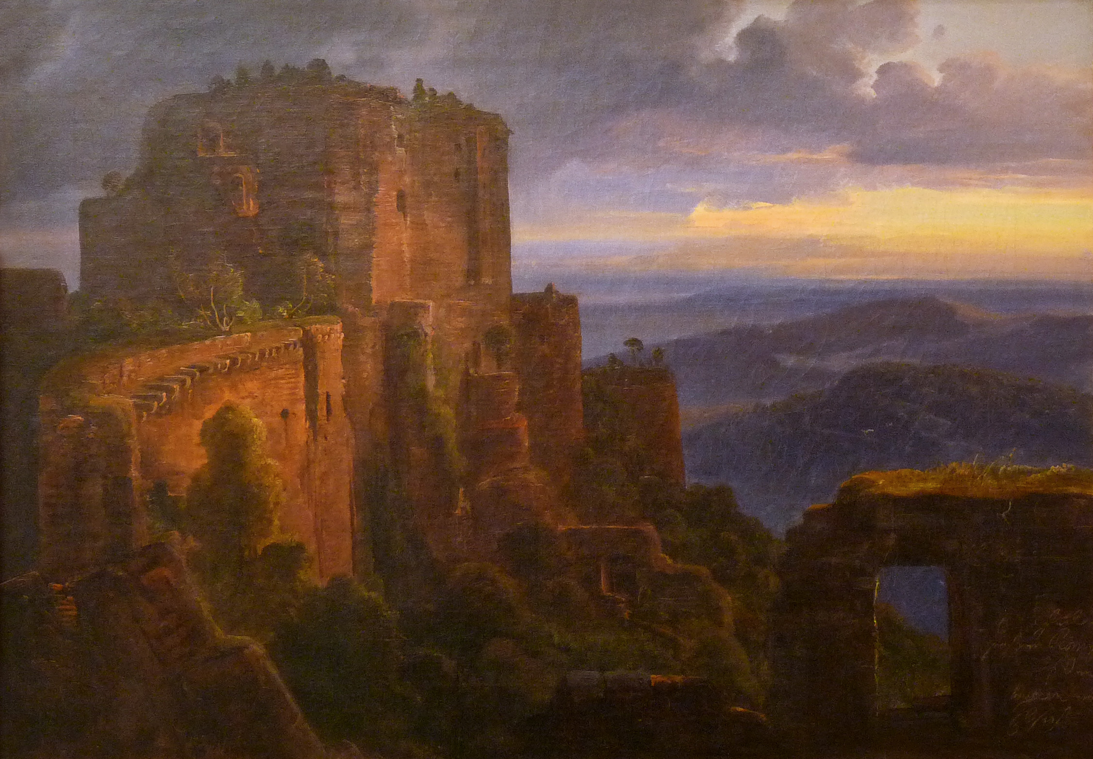 Christian Ernst Bernhard Morgenstern, Ruine du Haut-Koenigsbourg, 1836, huile sur toile, exposition temporaire au Musée Unterlinden -collection particulière)